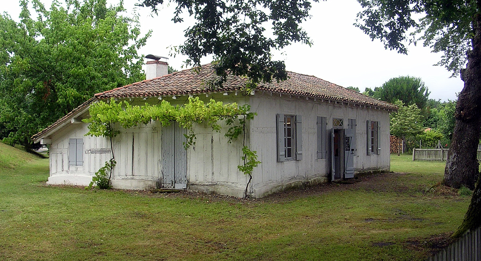 Maison de Félix Arnaudin à Labouheyre (Landes, France)